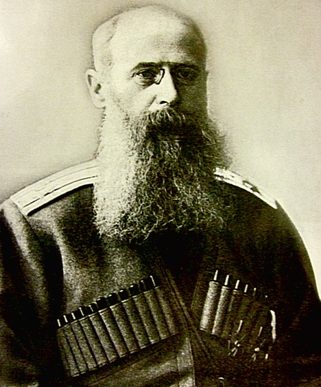 Князь, бывший толстовец Дмитрий Александрович Хилков (1858-1914)